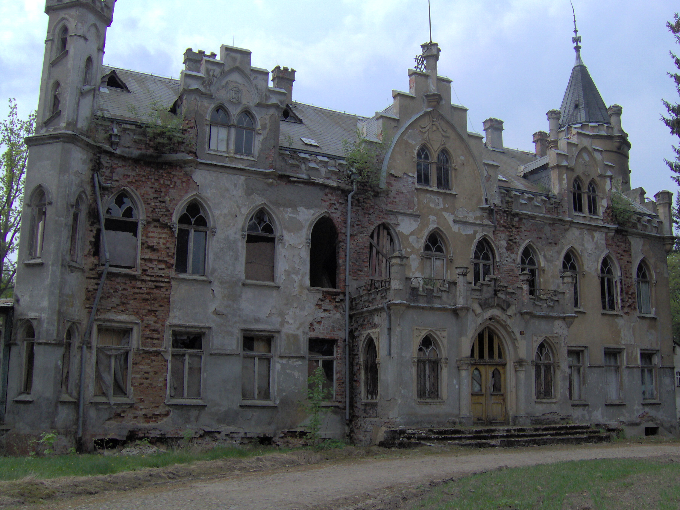 Pałac w Podwilczu.